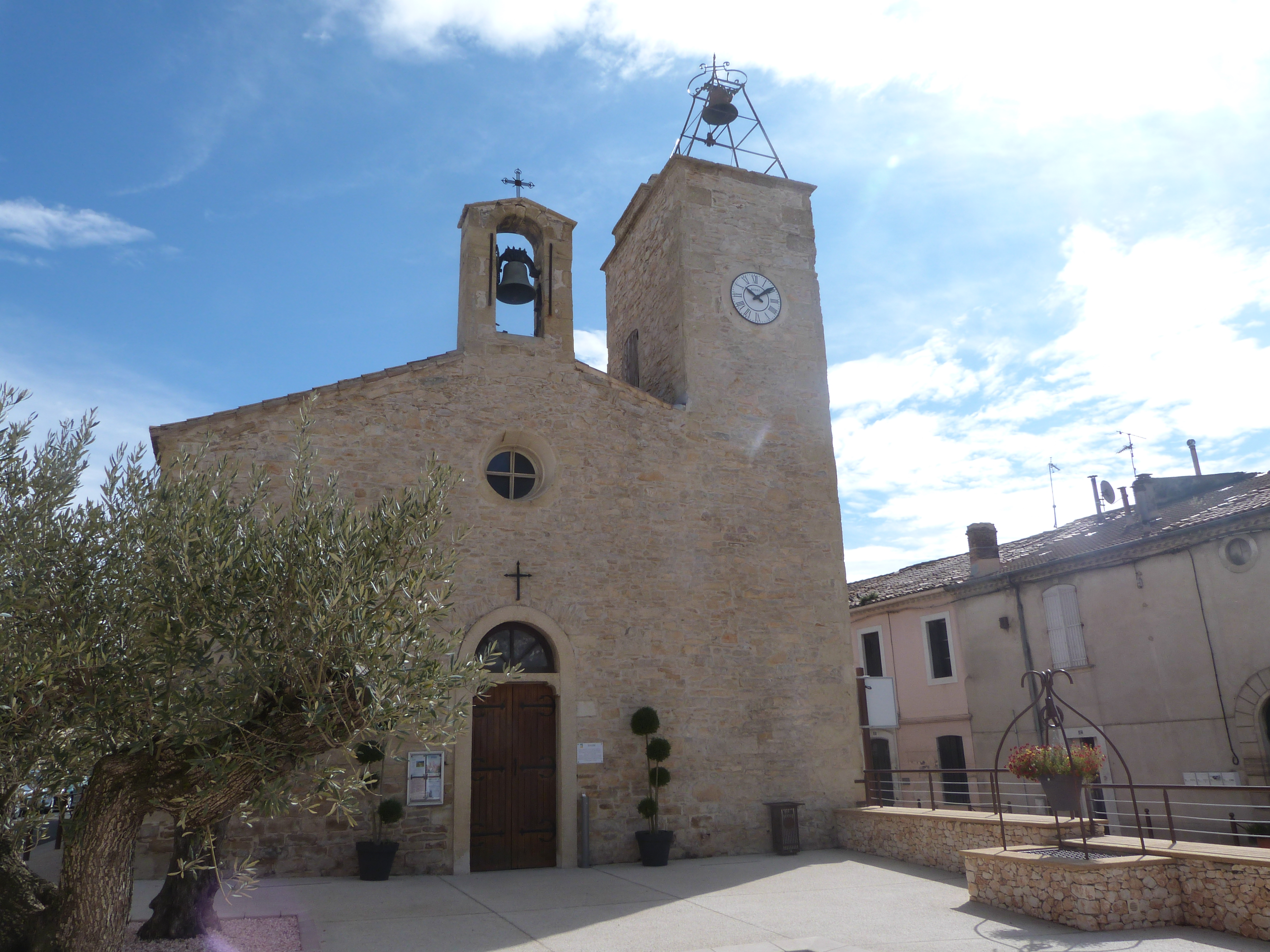 Place de l'Église, Uchaud, Gard